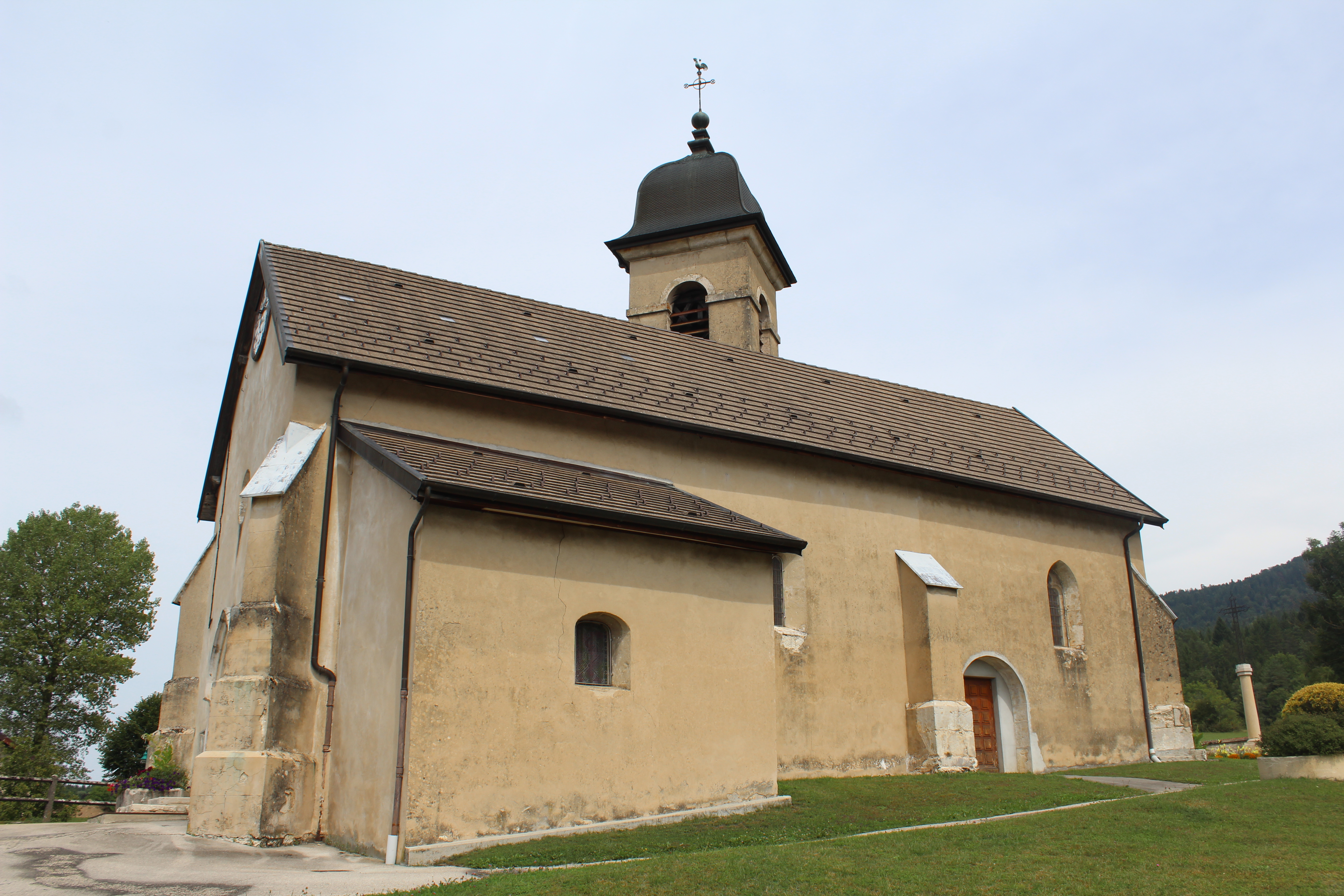 Église Saint-Maurice de Martignat.